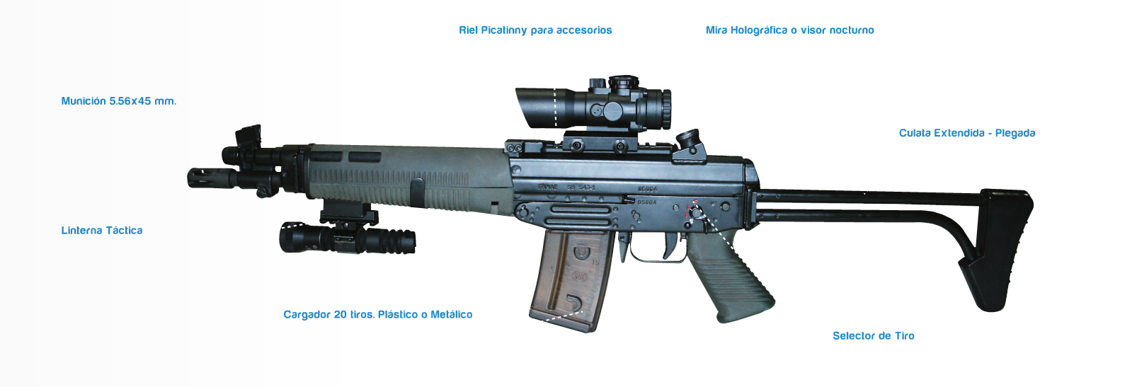 Captura de catálogo de Famae